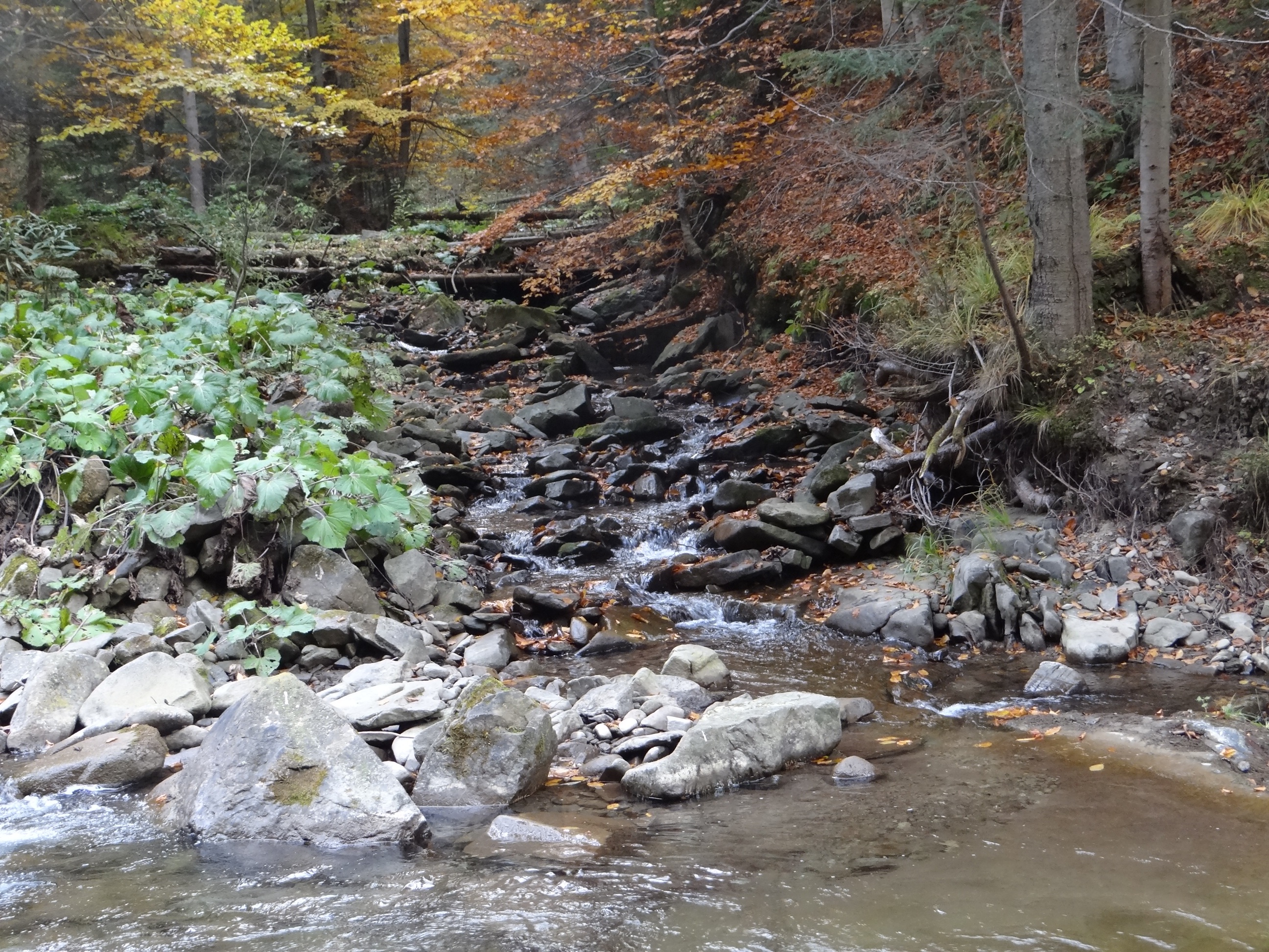 Ujście Gorcowego Potoku do Kamienicy